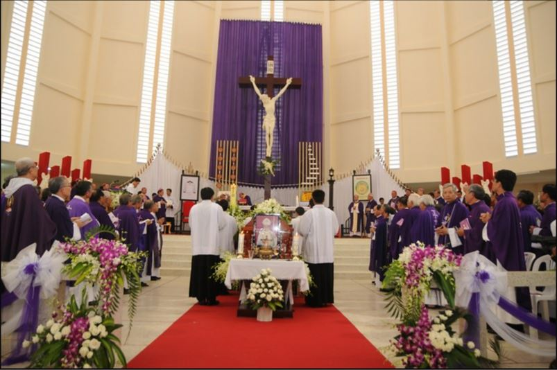 Lễ tang cố giám mục Tôma Nguyễn Văn Tân